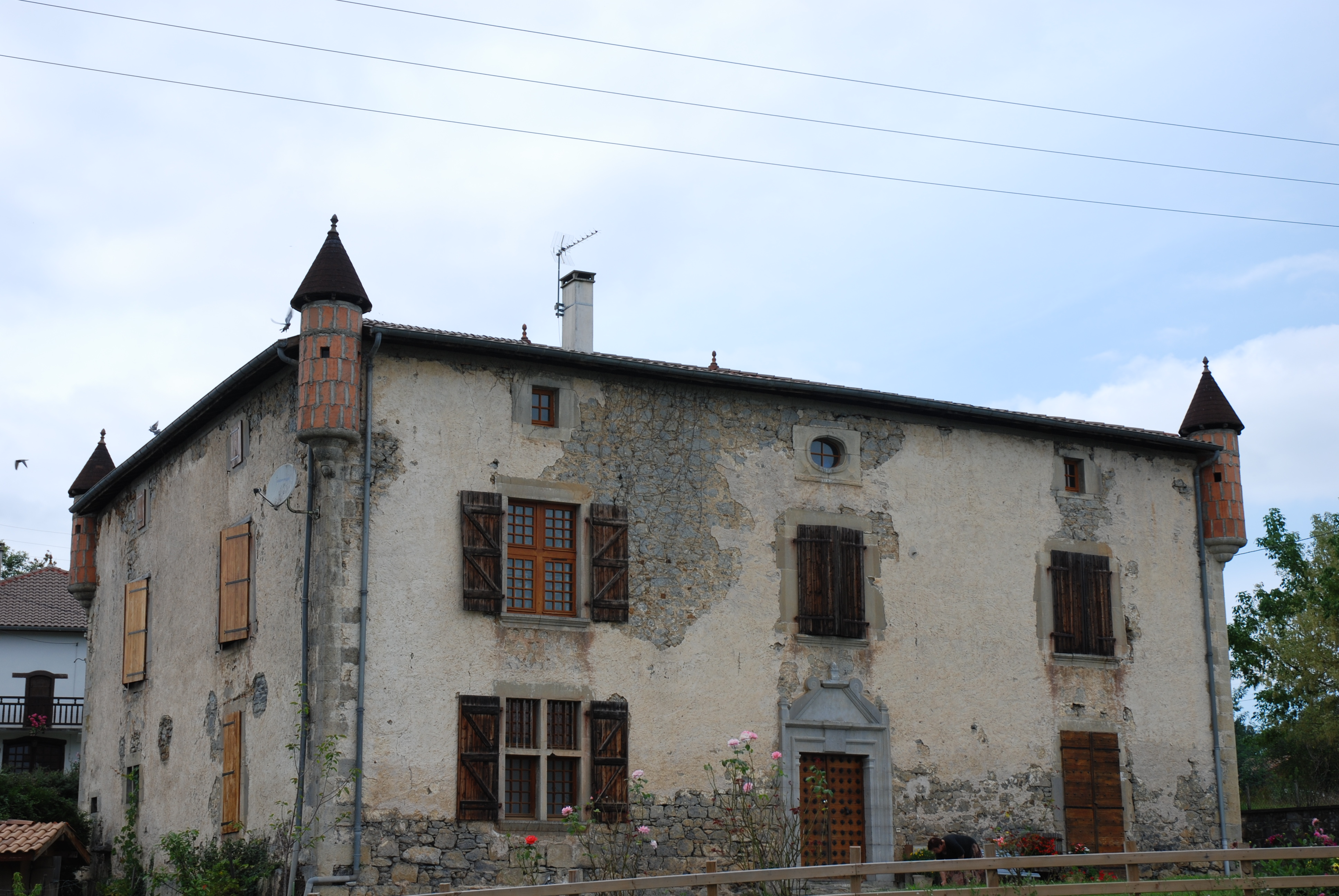 Iholdy, manoir Elizabelar